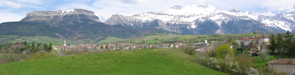 Mens en Trièves, vue générale depuis Le Foreyre. Vue sur le Dévoluy et le Chatel